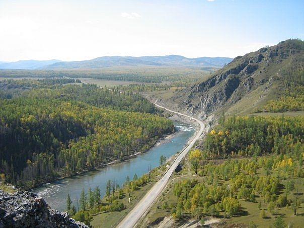 Закамна